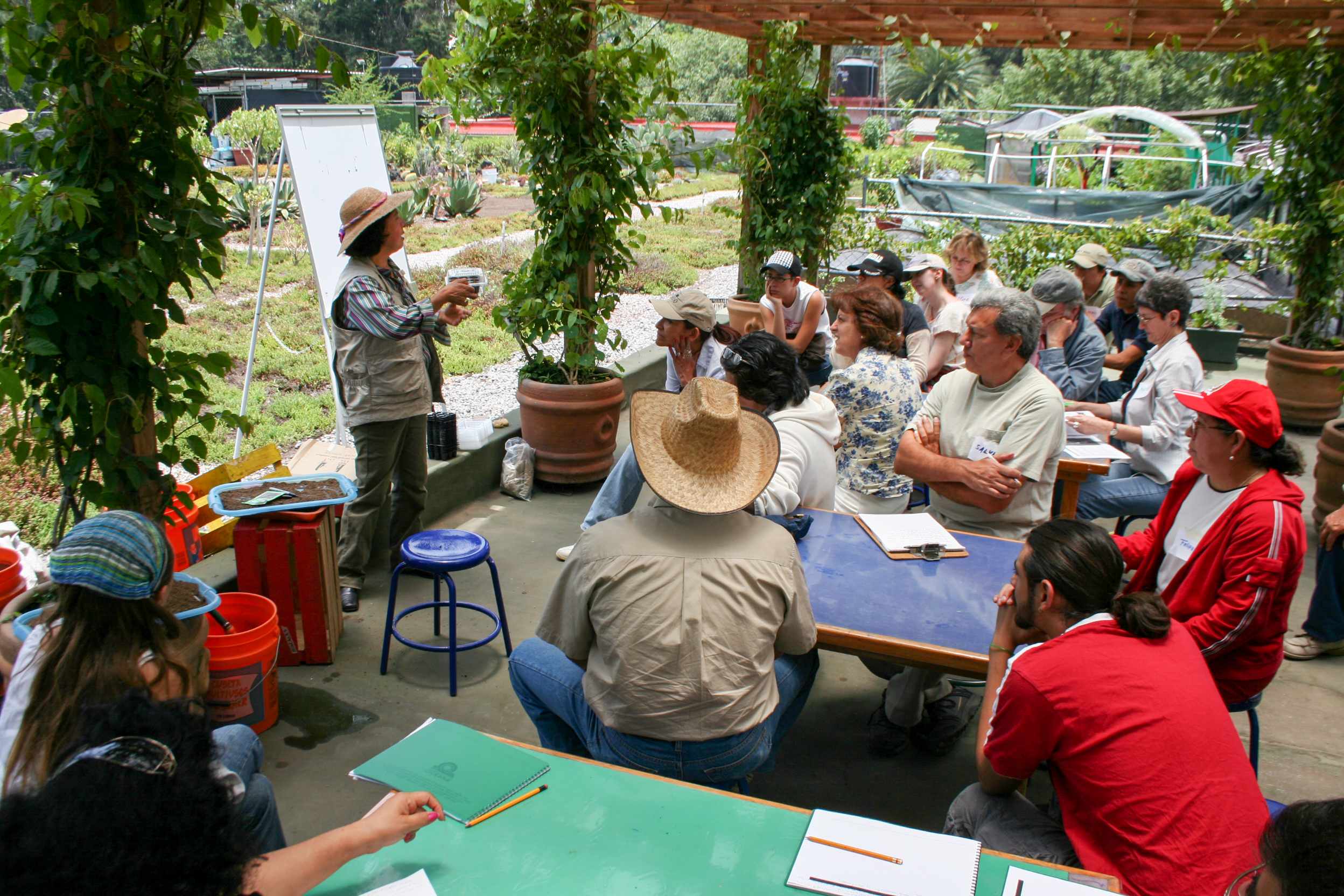 Curso de agricultura organica impartido por Alejandra Juarez en el Jardin Botanico (azotea naturada) de CICEANA